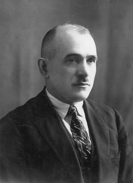 Józef Grzecznarowski działacz PPS z Radomia